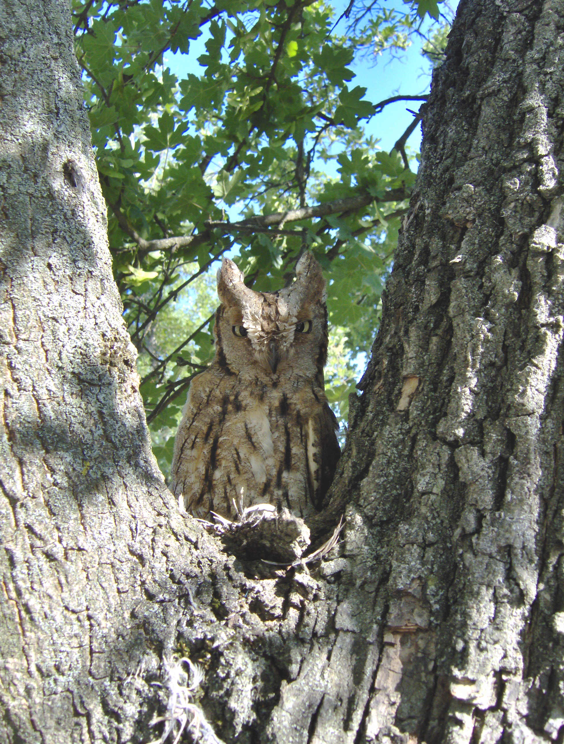 Assiolo fotografato fra due rami di un acero campestre lungo il Torrente Scrivia